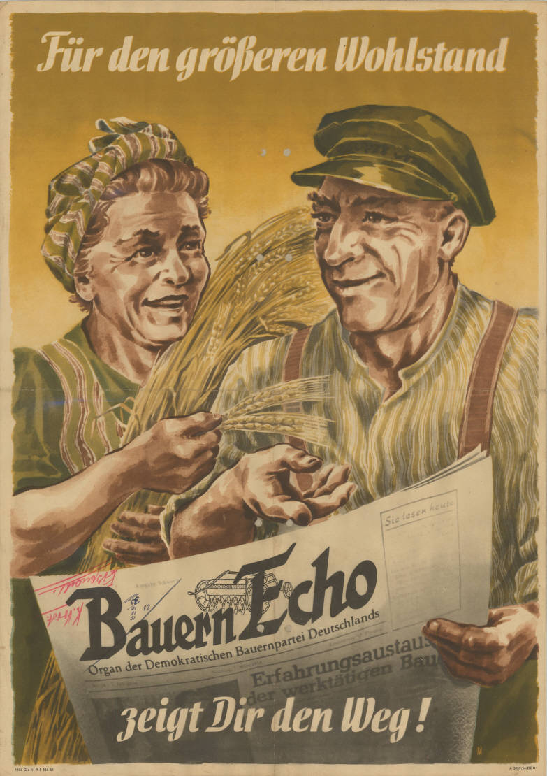 Für den größeren Wohlstand Bauern Echo zeigt Dir den Weg! Abbildung: Älteres Bauernehepaar mit Ährengarbe liest das Bauer Echo (Grafik) Kommentar: Auf Tapete aufgeklebt, auf der Vorderseite beschriftet Plakatart: Motiv-/Textplakat Künstler_Grafiker: Signet "M" Auftraggeber: DBD Bauern Echo Drucker_Druckart_Druckort: 1104 Gie III-9-5 54 50 A 3057/54/DDR Objekt-Signatur: 10-024 : 1054 Bestand: Plakate aus der SBZ/DDR (10-024) GliederungBestand10-18: Demokratische Bauernpartei Deutschlands (DBD) Lizenz: KAS/ACDP 10-024 : 1054 CC-BY-SA 3.0 DE